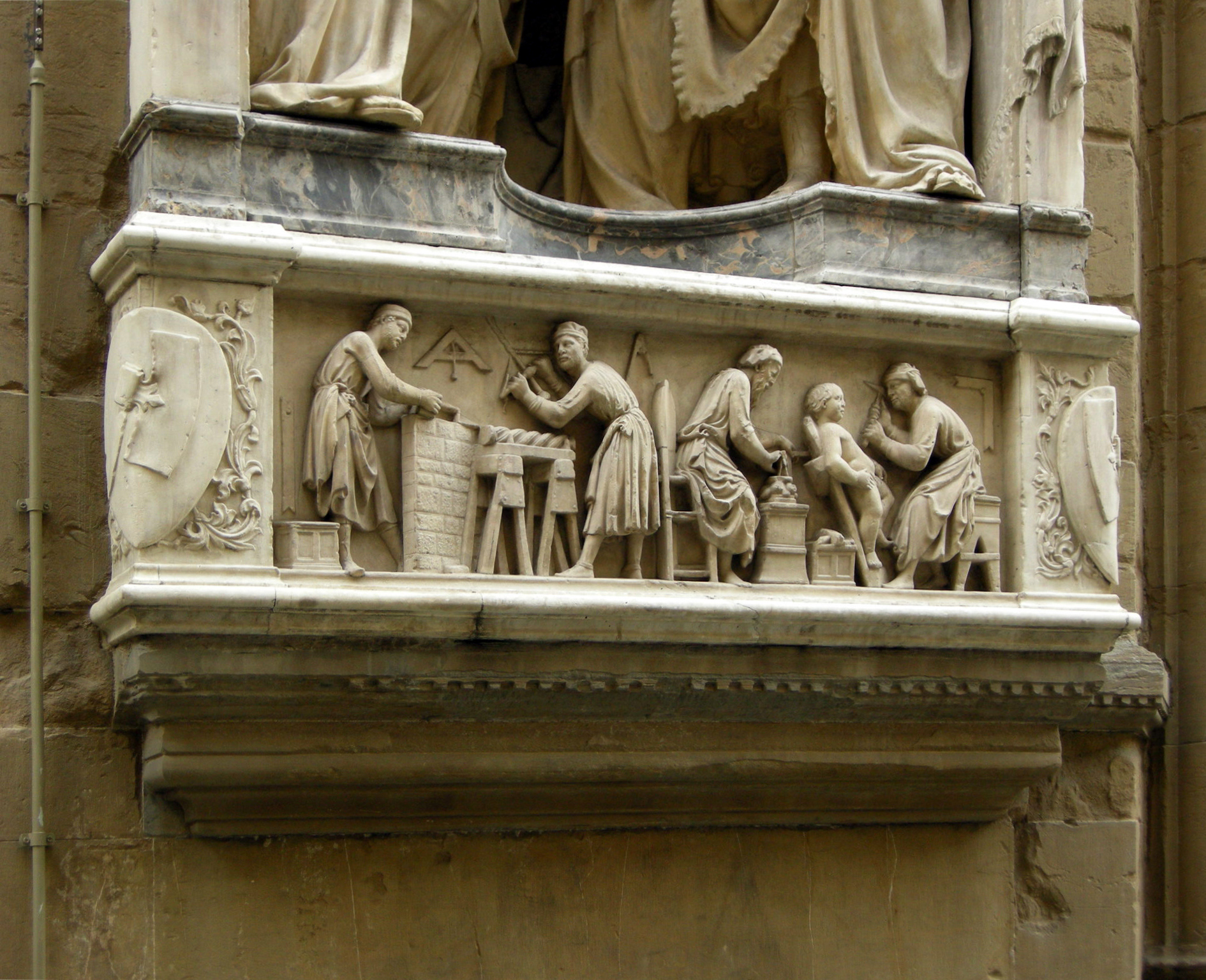 Orsanmichele, tabernacolo dell'arte dei maestri di pietra e legname